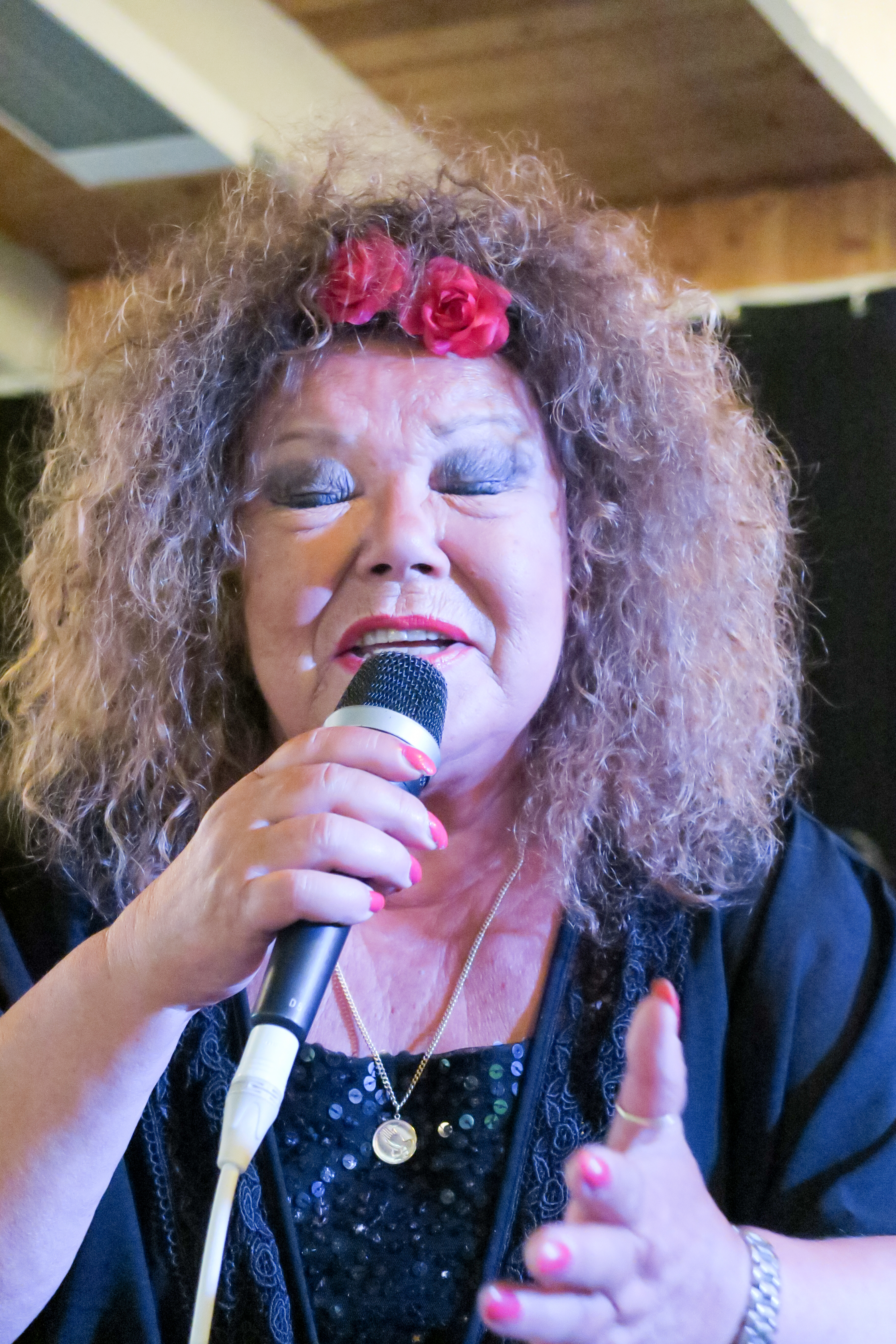 Anita Hirvonen suomalainen laulaj